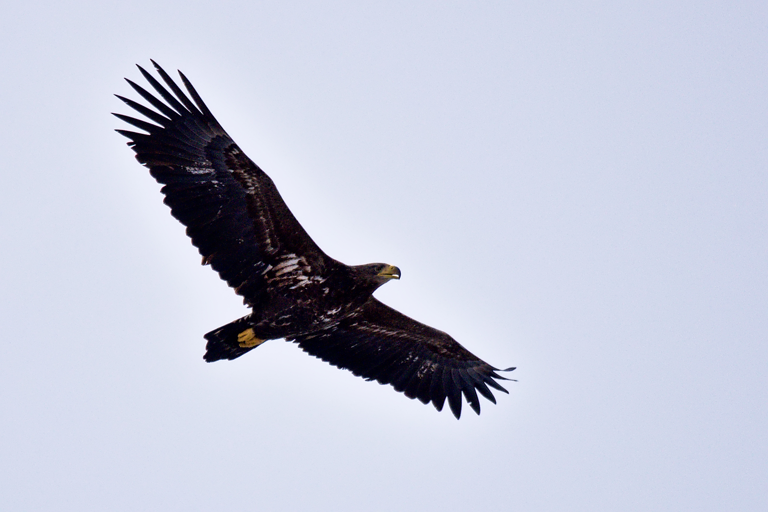 Juvenil havsörn i Ekeby våtmark.